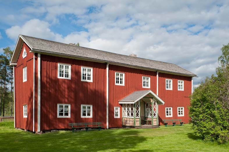 Ljusdal Fågelsjö 1:1. Mangårdsbyggnad, nybyggnadsår 1818. Djupt inne i Orsa finnmark, i gränslandet mellan Hälsingland, Dalarna och Härjedalen, ligger Fågelsjö gammelgård, eller ”Bortom åa”, som den kallas i bygden. Här erbjuds en mycket god inblick i det liv som levdes på gården under 1800-talet. Hälsingegårdar. Motiv: Ljusdal Fågelsjö 1:1 Nyckelord: Byggnadsminnen, Riksintressen, Världsarv Kategori: Jordbruksegnahem Ljusdal Fågelsjö 1:1. Mangårdsbyggnad, nybyggnadsår 1818. Djupt inne i Orsa finnmark, i gränslandet mellan Hälsingland, Dalarna och Härjedalen, ligger Fågelsjö gammelgård, eller ”Bortom åa”, som den kallas i bygden. Här erbjuds en mycket god inblick i det liv som levdes på gården under 1800-talet. Hälsingegårdar. Ljusdal Fågelsjö 1:1.